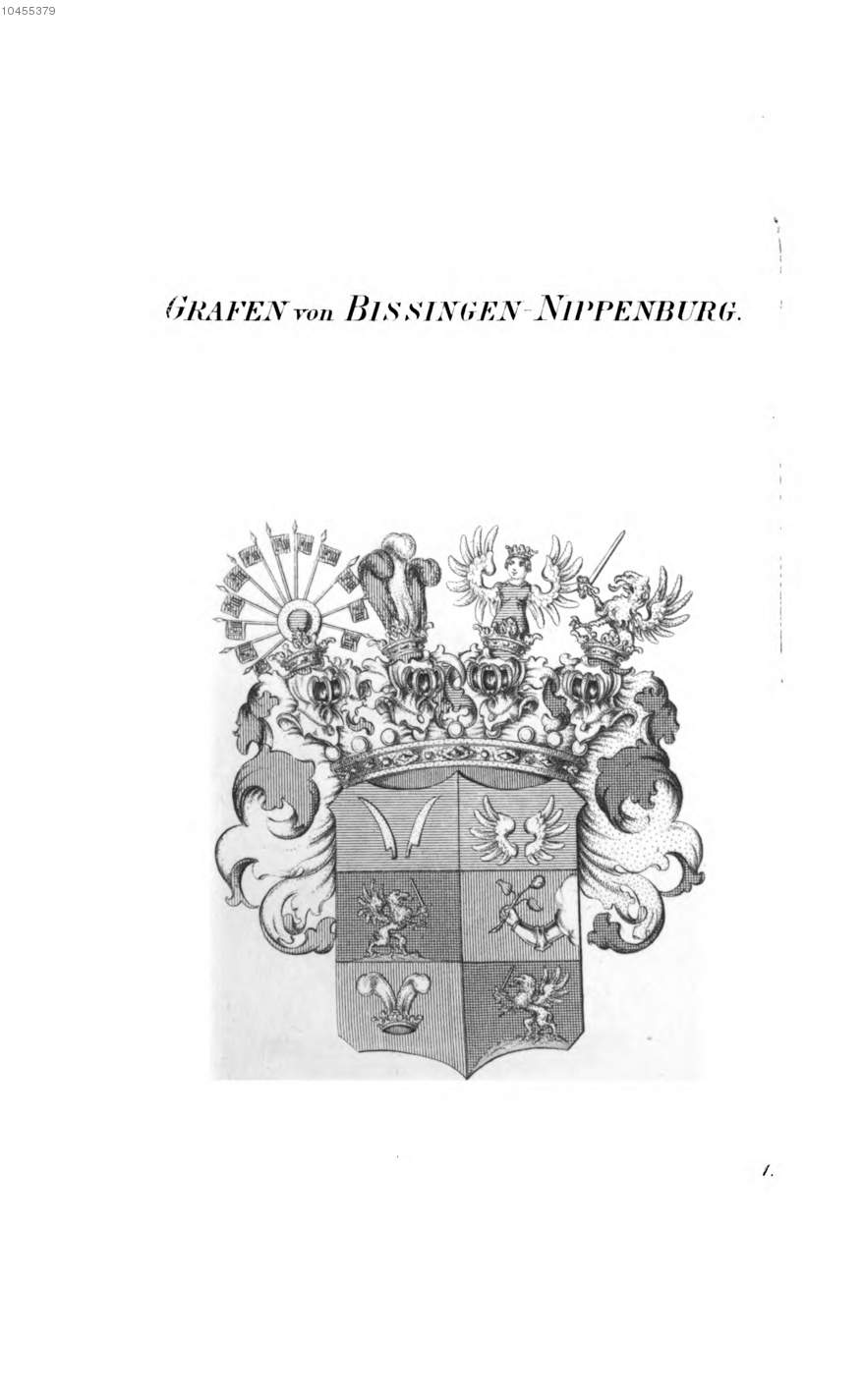 Wappen Grafen von Bissingen-Nippenburg Laut Register Verbesserung der unrichtigen Darstellung in Band 1 File:Tyroff Württ 1 037.jpg.